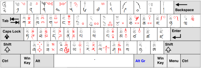 Windows版ゾンカ語キーボード